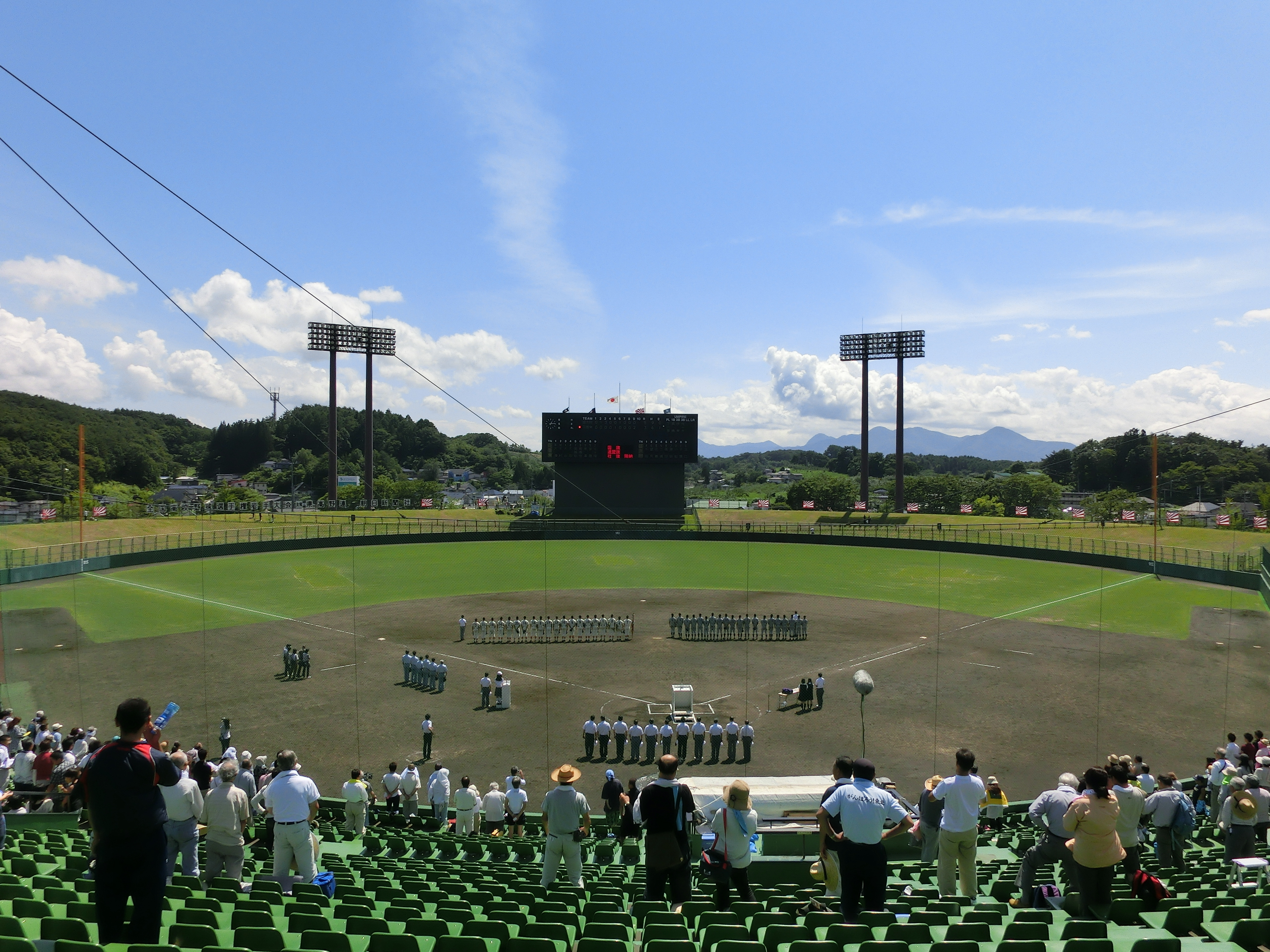 岩手県営野球場で行われた第94回全国高等学校野球選手権岩手大会の閉会式